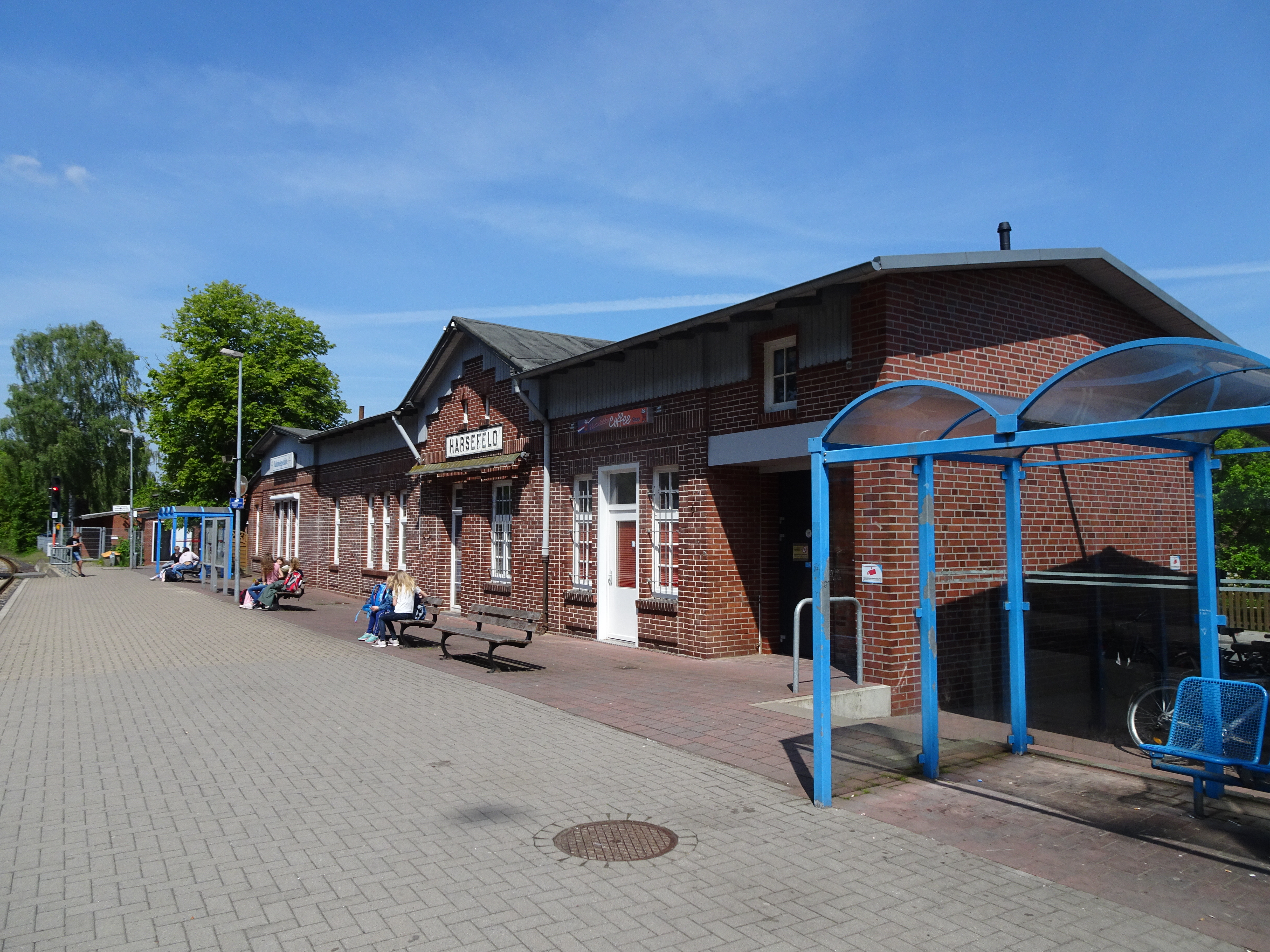 Harsefeld Bahnhof 2019